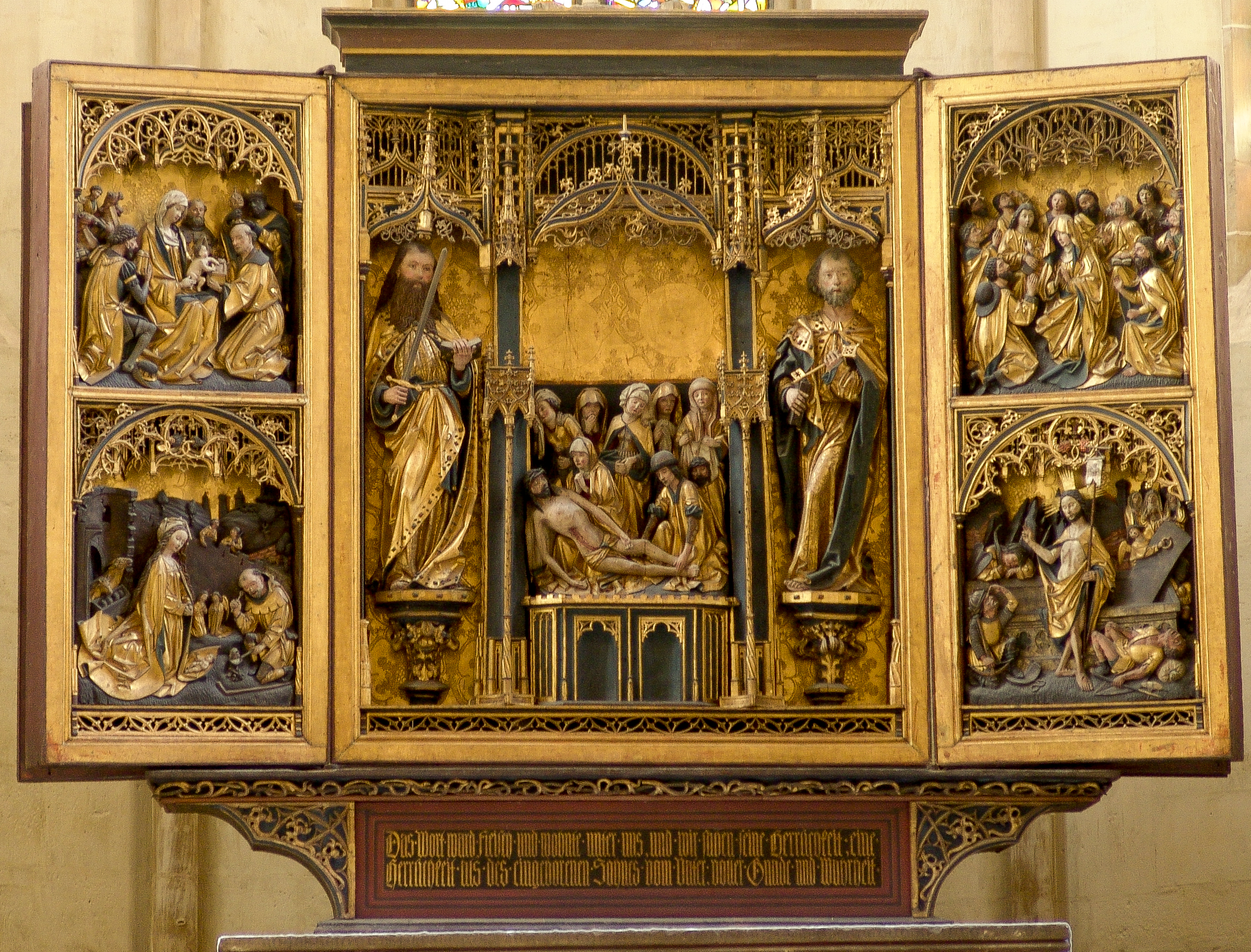 Predigerkirche in Erfurt